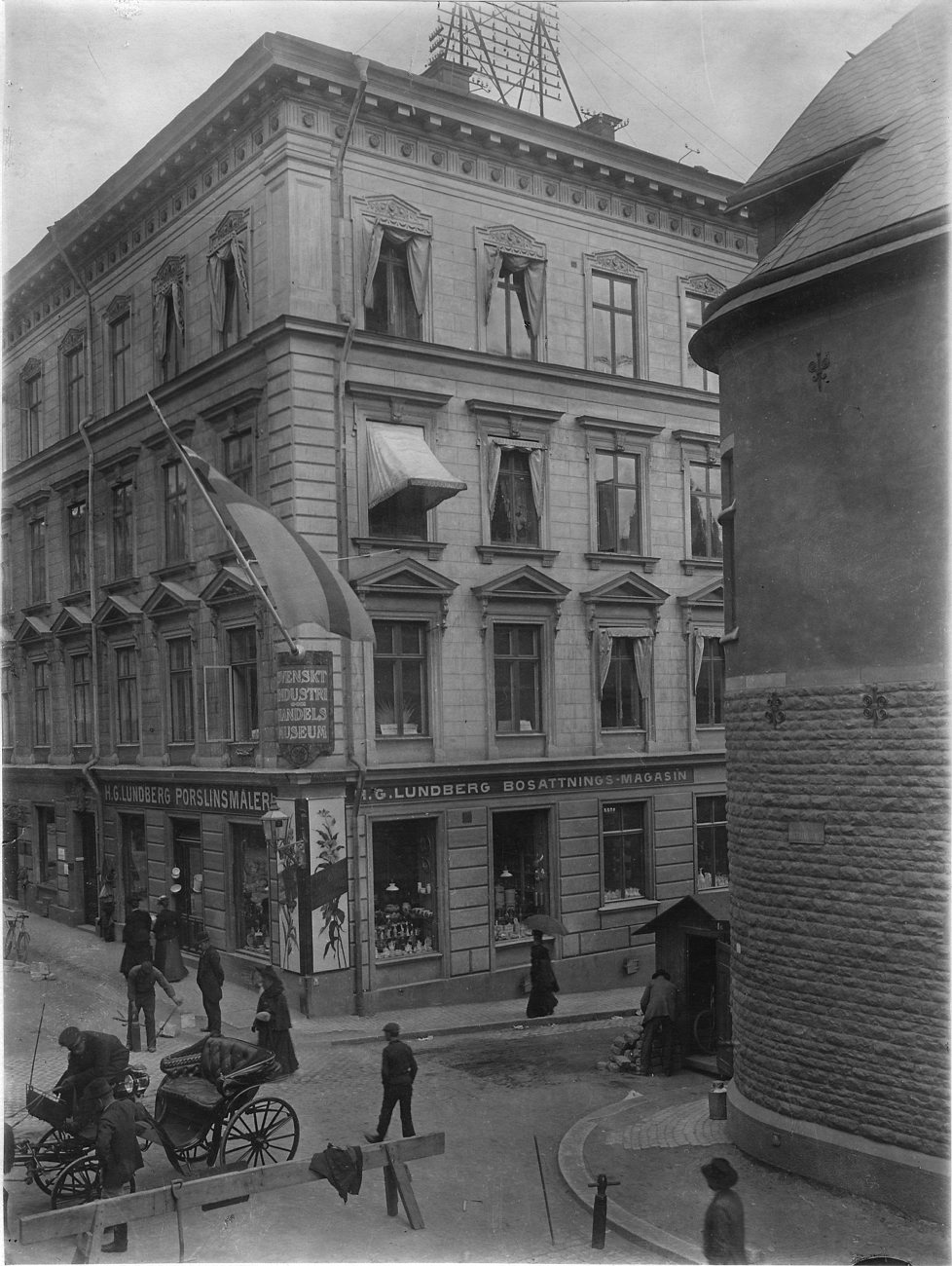 DIG96955 L Svenskt Industri- och Handelsmuseum. Regeringsgatan 40, Stockholm. (H.G. Lundbergs Porslinsmåleri).